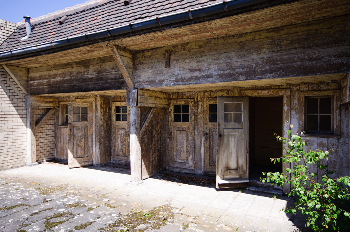 Sonnenterrasse auf dem Dach des Stadtbades Lichtenberg mit Duschraum für Männer und Umkleidekabinen,.